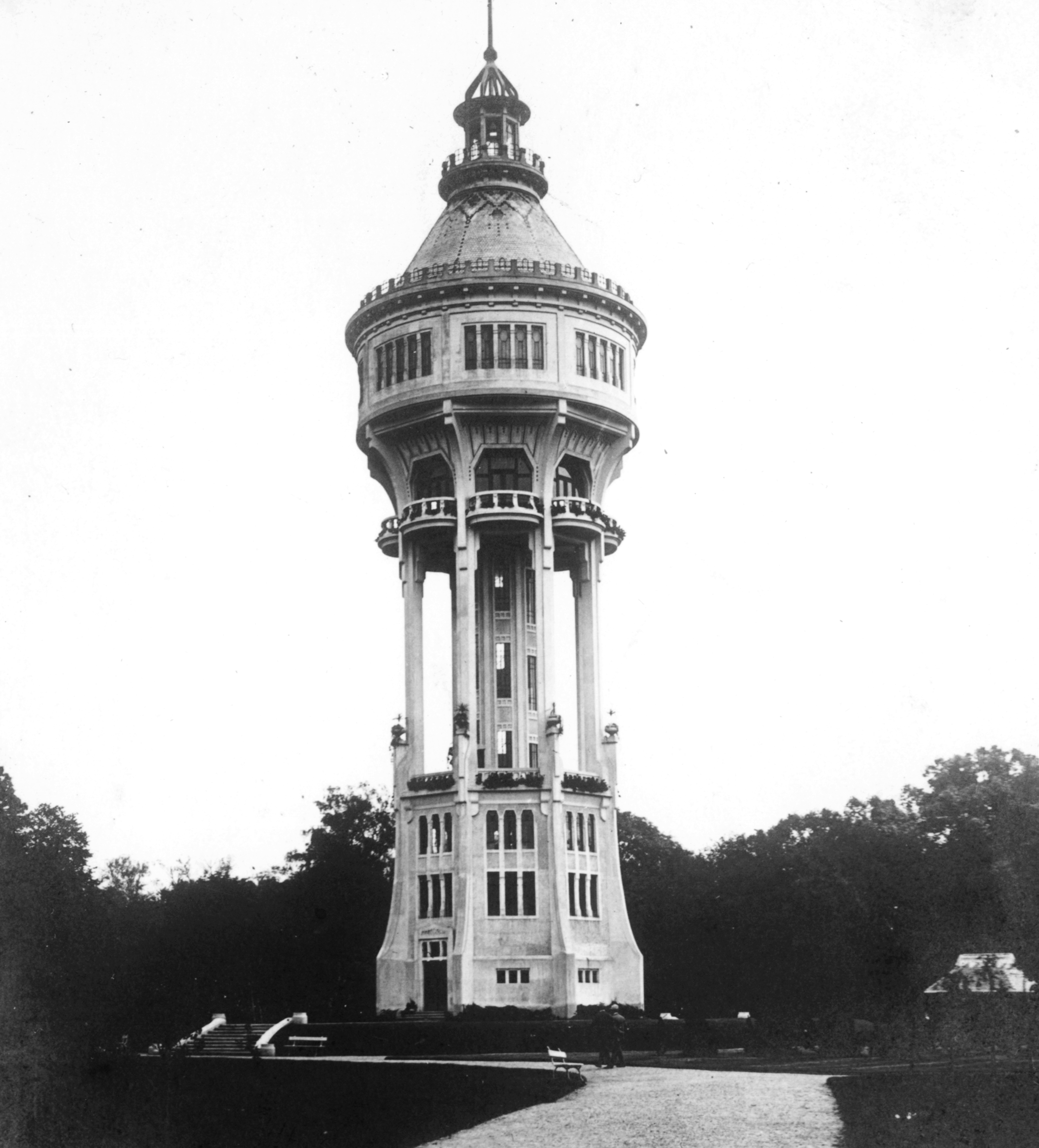 Víztorony. Location: Hungary, Budapest, Margit Islands Tags: water tower Title: Víztorony.